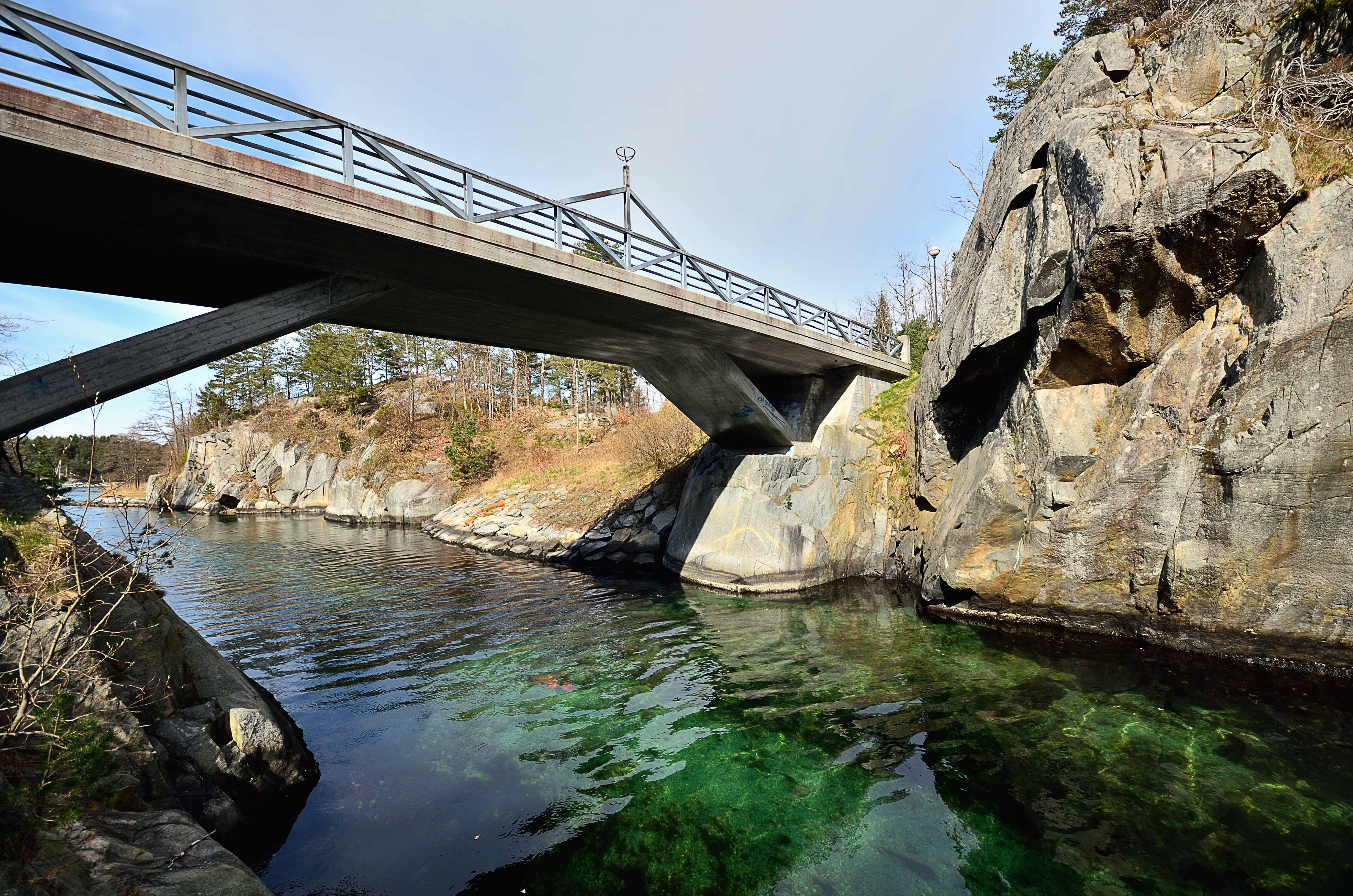 Broa over Kassenkanalen.